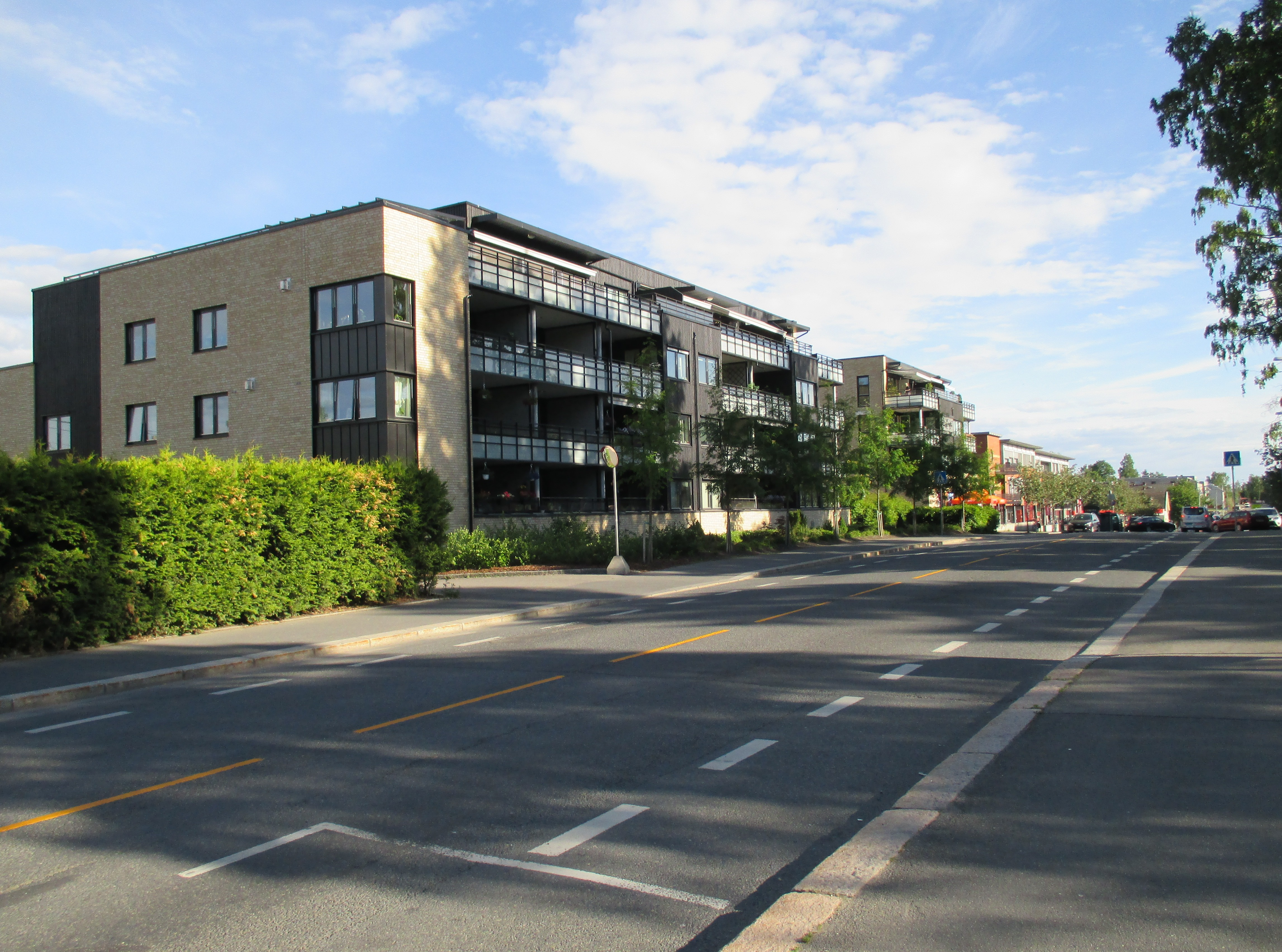 Vækerøveien på Røa, ved rundkjøringen ved Sørkedalsveien